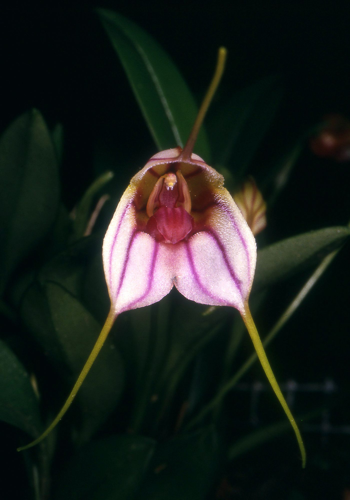 Masdevallia yungasensis